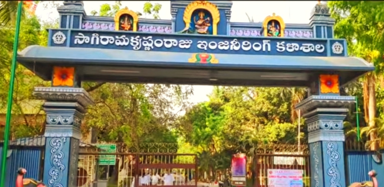 సాగి రామకృష్ణం రాజు ఇంజనీరింగ్ కళాశాల